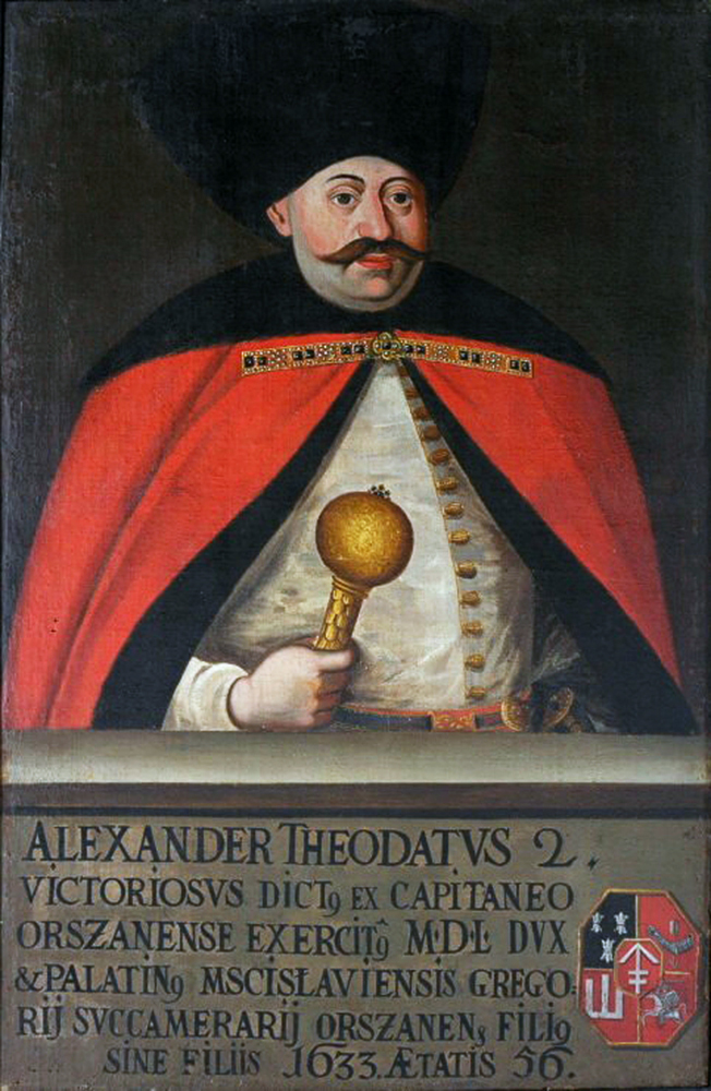 Беларуская (тарашкевіца): Партрэт Аляксандра Дажбога Сапегі (Alaksandar Dažboh Sapieha) гербу «Ліс» (1587—1635), дзяржаўнага і вайсковага дзеяча Вялікага Княства Літоўскага, кашталяны віцебскага, чашніка вялікага літоўскага.